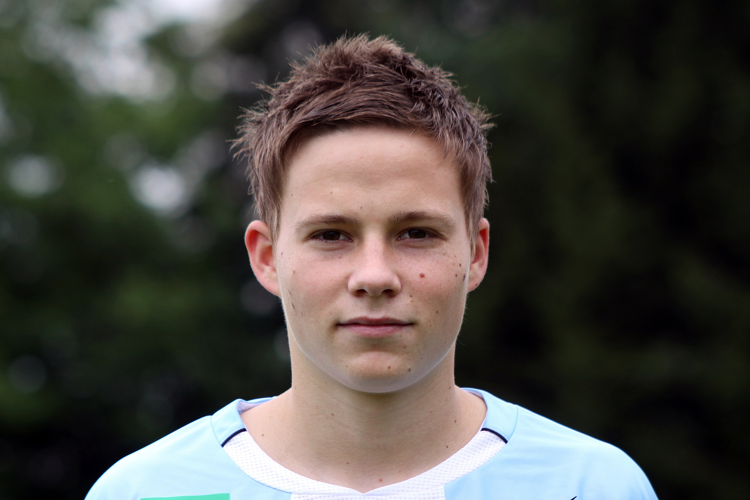 Stefan Rakowitz - TSV Hartberg (2)